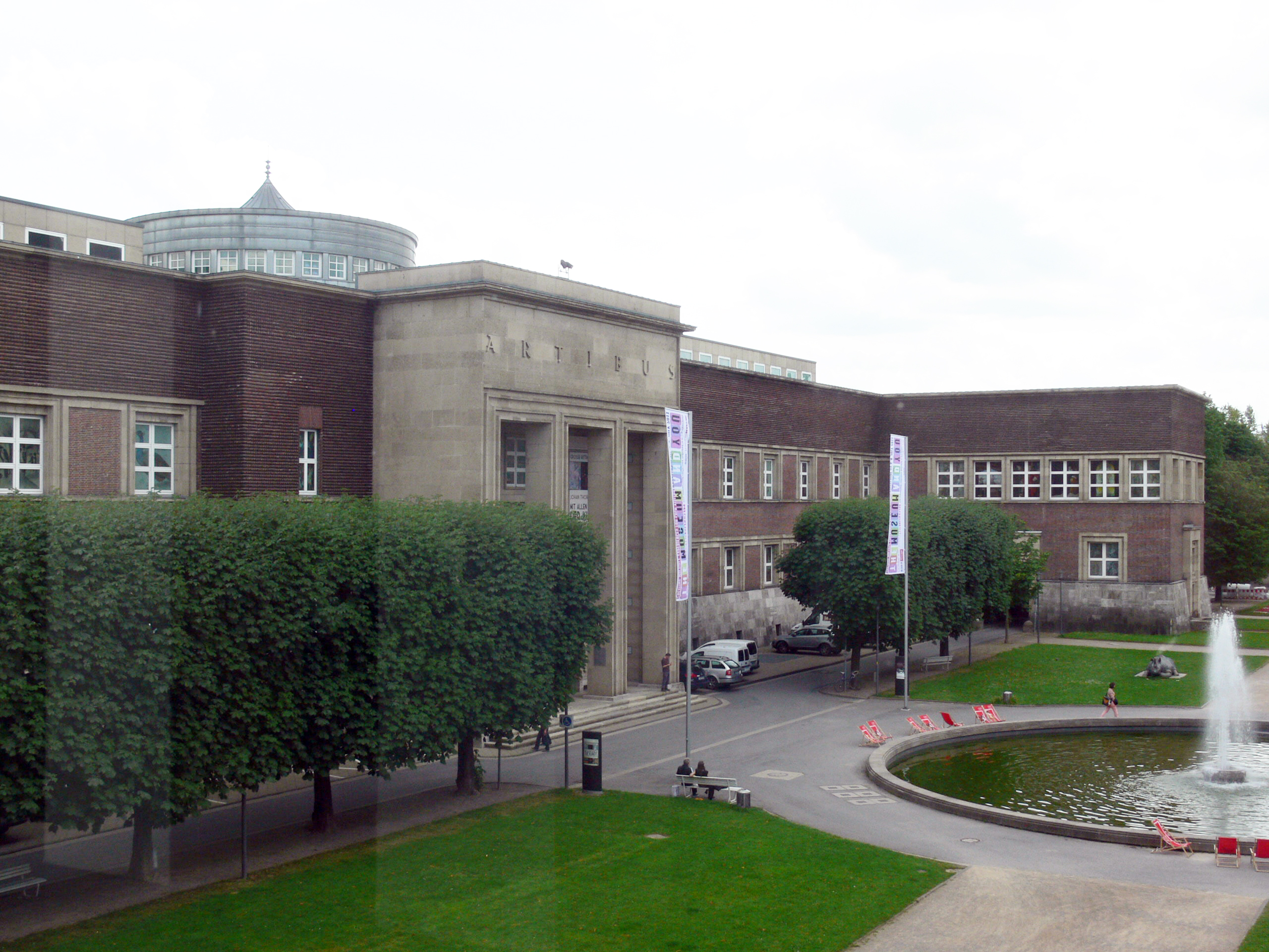 Museum kunst palast, Düsseldorf